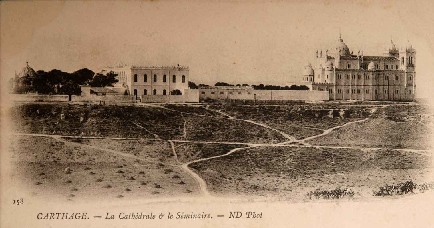 La cathédrale Saint-Louis de Carthage, Tunisie